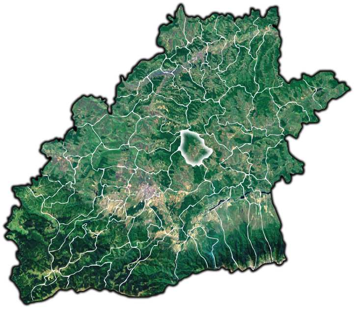 Vurpar jud Sibiu